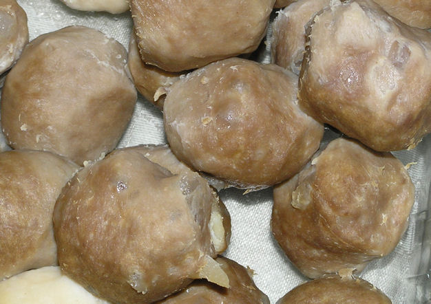 Beef ball beefball